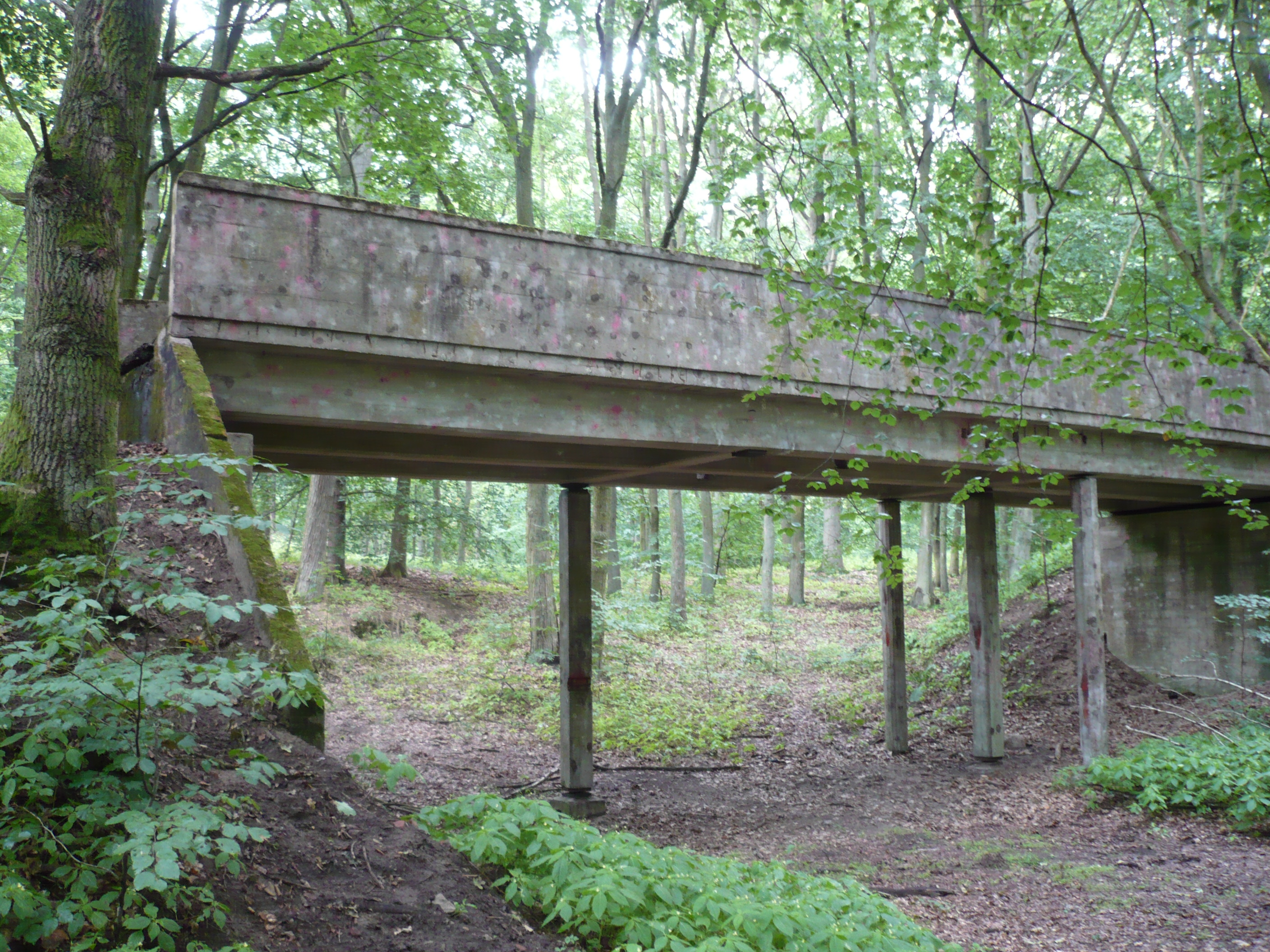 Drugi most na uroczysku